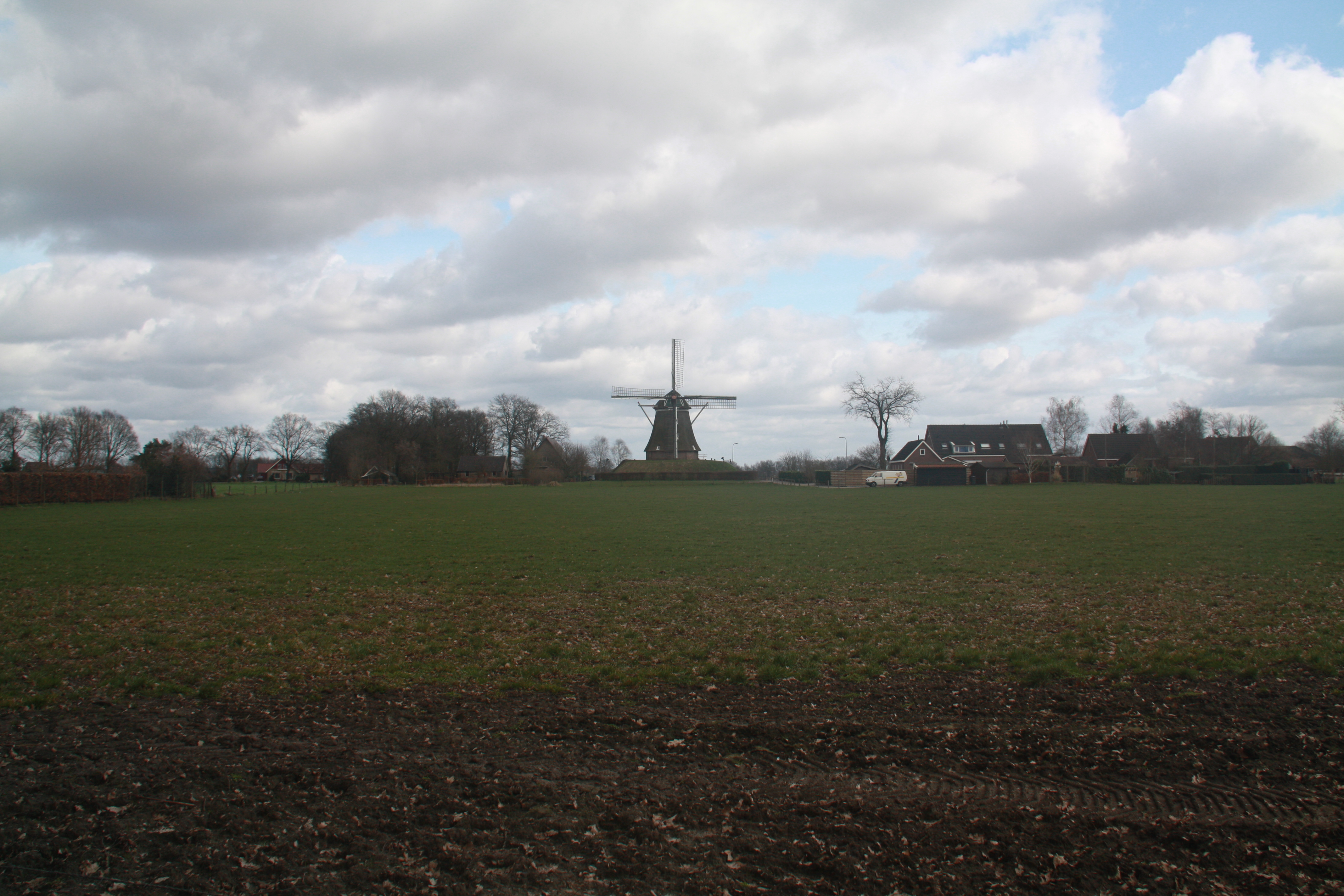 Anermolen